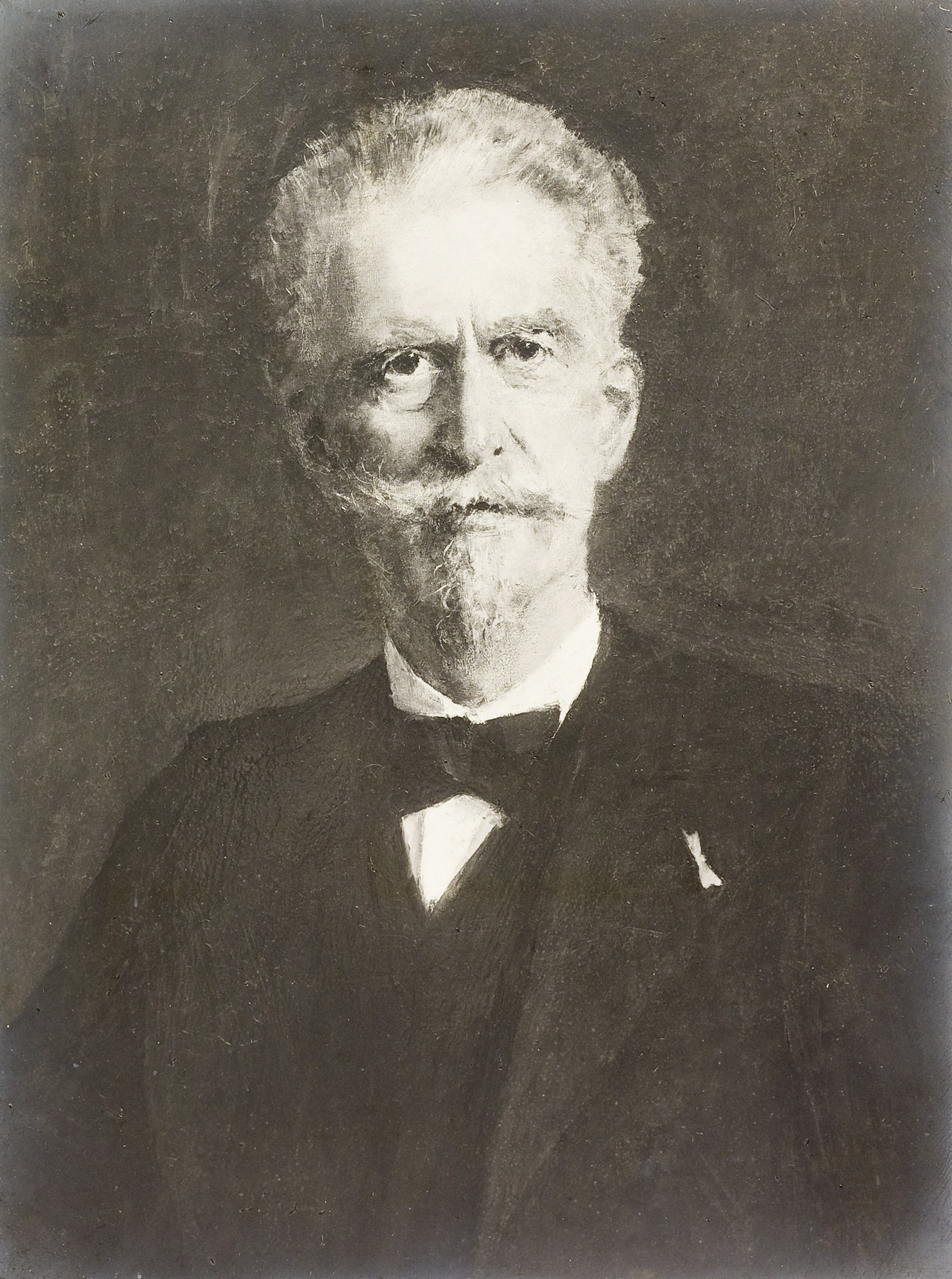 Emile Keller (1828-1909)